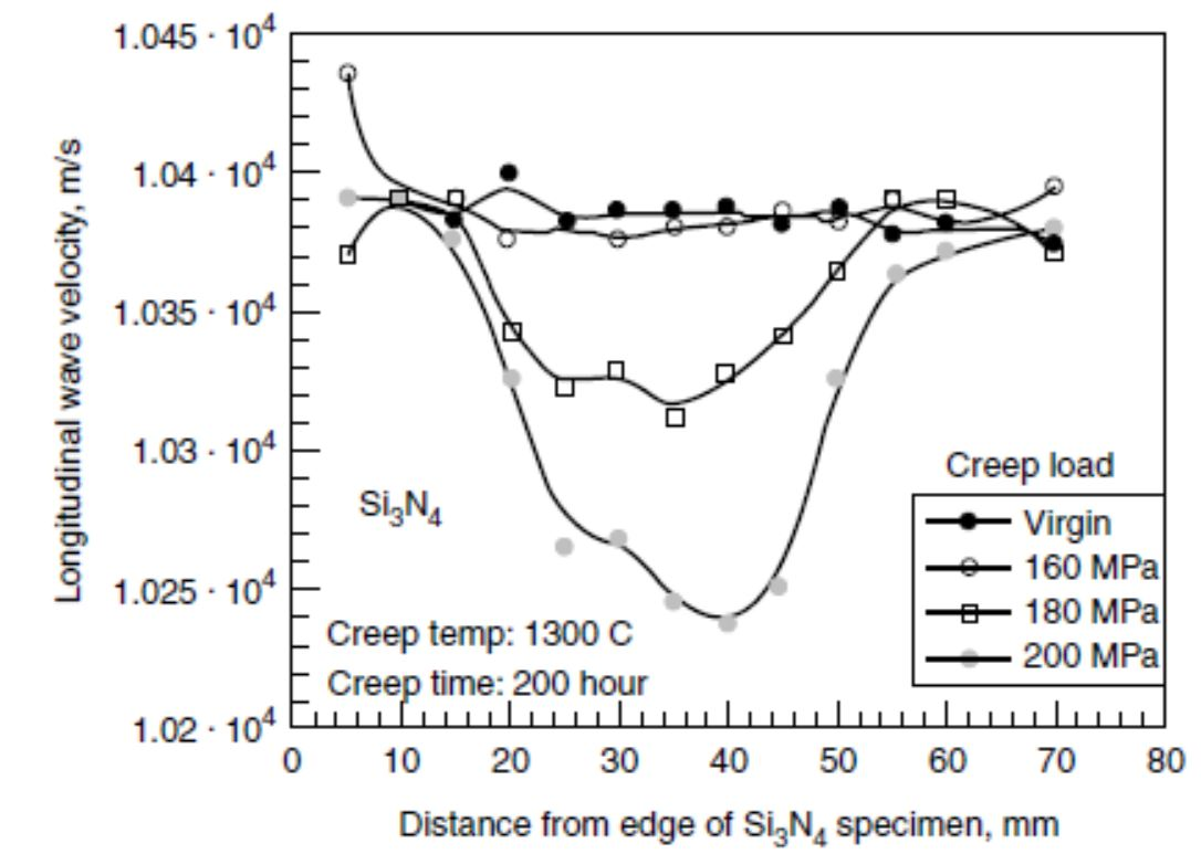 Sensitivity of ultrasonic velocity to distributed creep damage